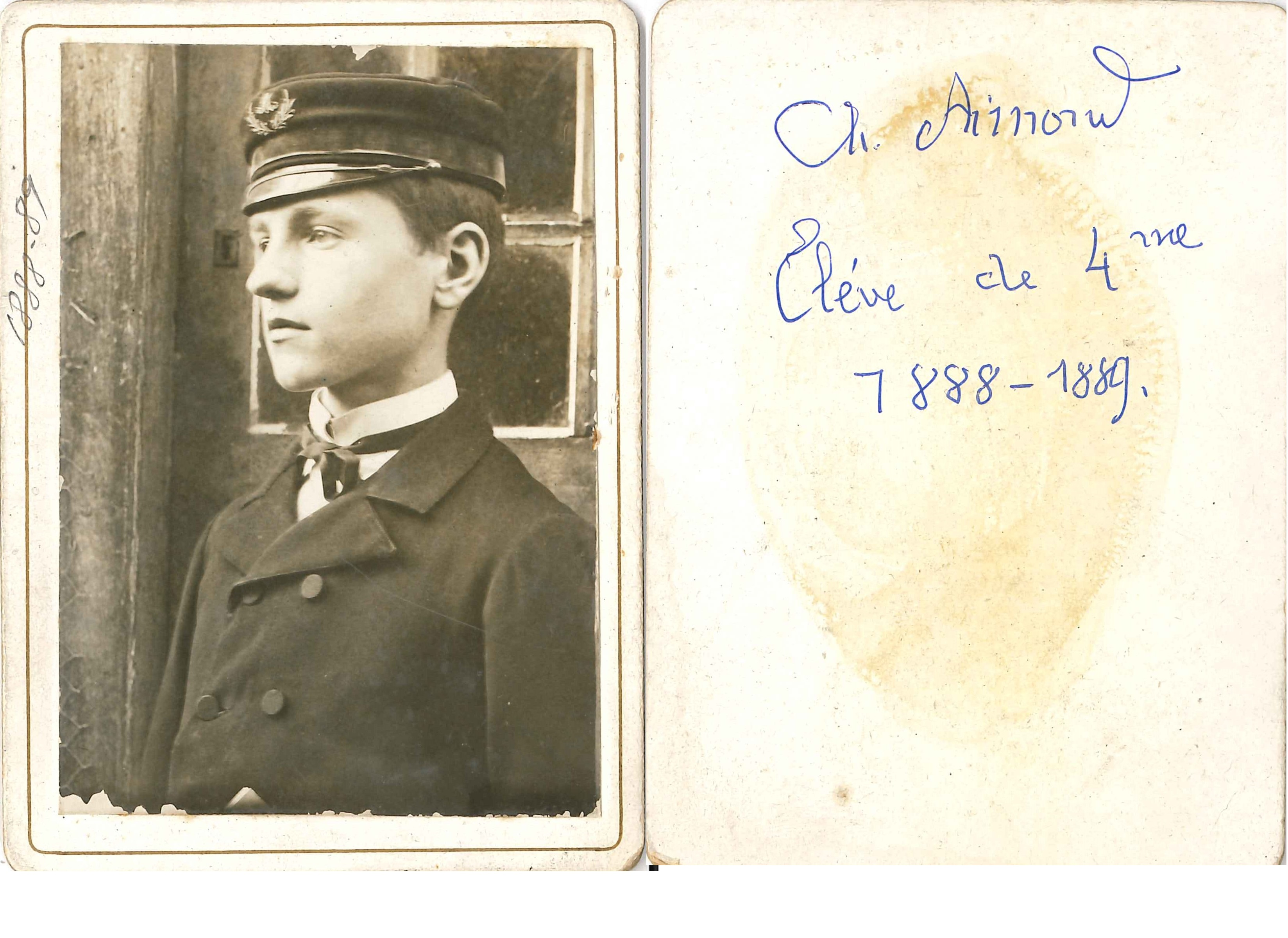 Charles Aimond élève de 4ème (1888-89). Source : Archives Jean Grosdidier de Matons (1926–2017).